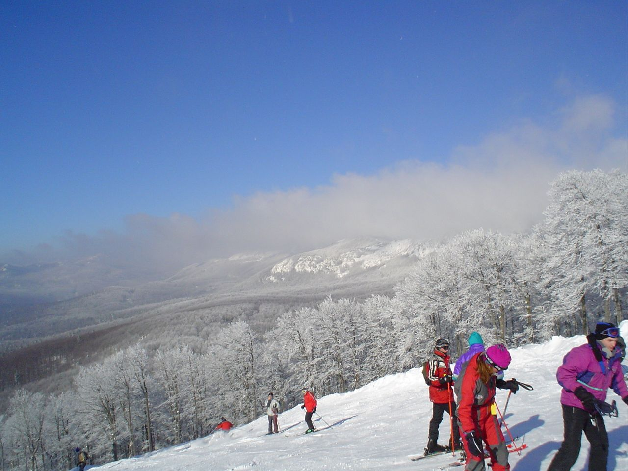 Platak - Radeševo 1363m